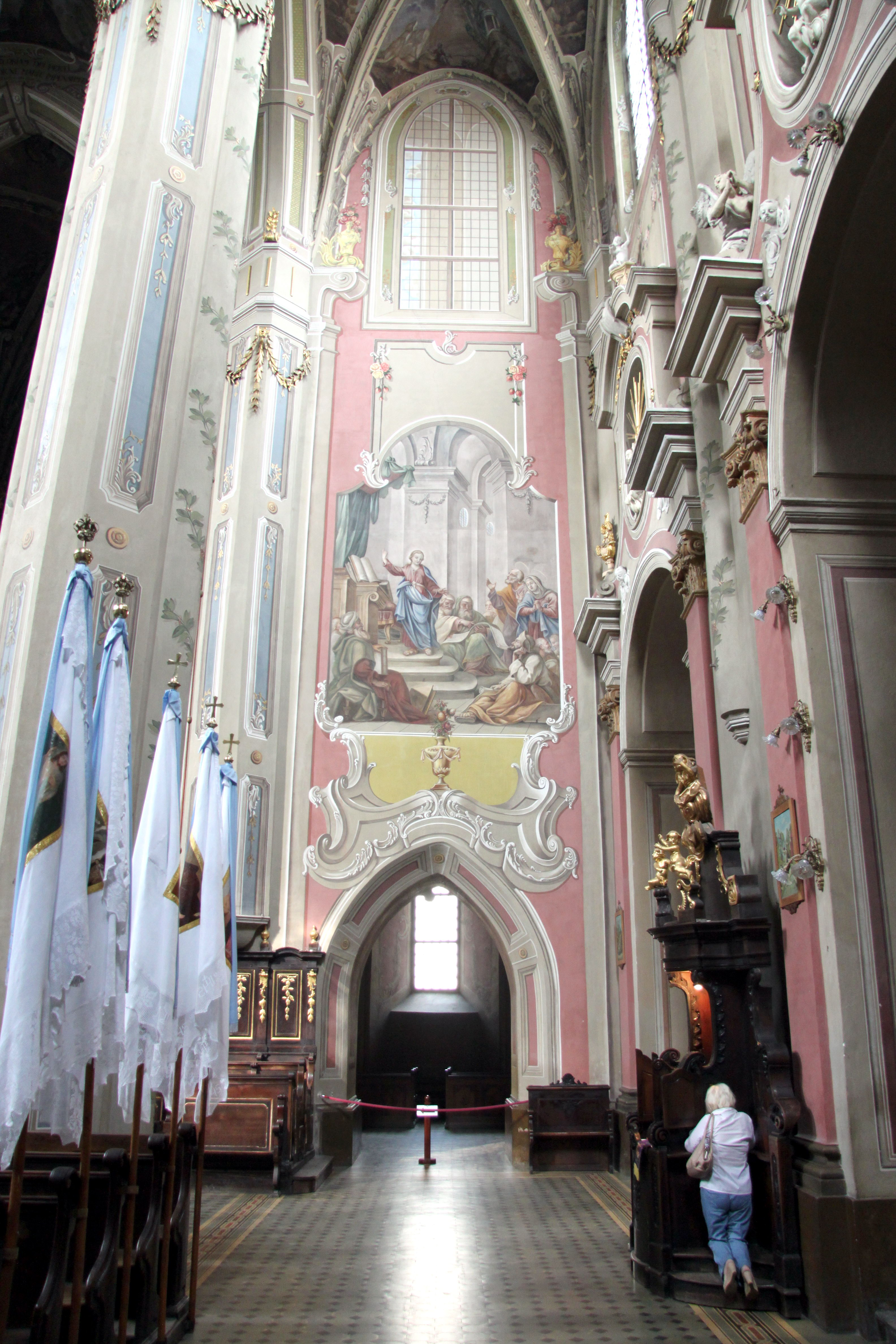 собор Кафедральний, Катедральна пл., 1, Львів